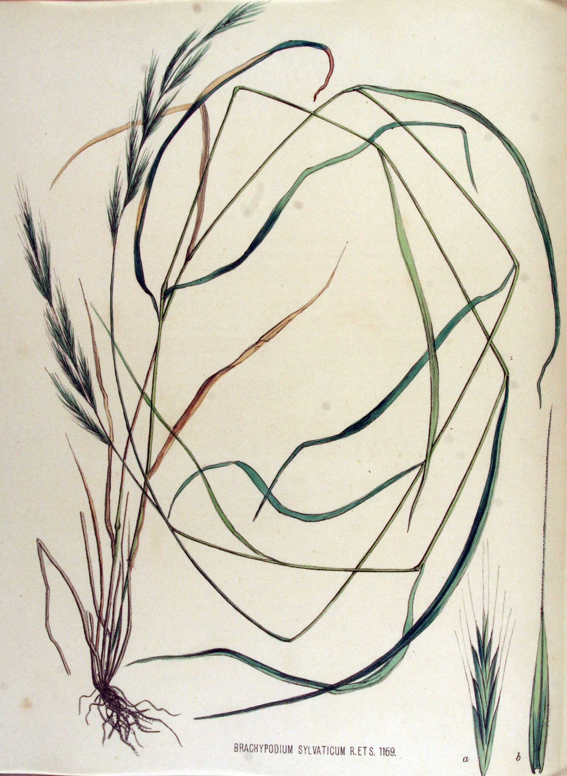 Brachypodium sylvaticum (Huds.) Beauv.